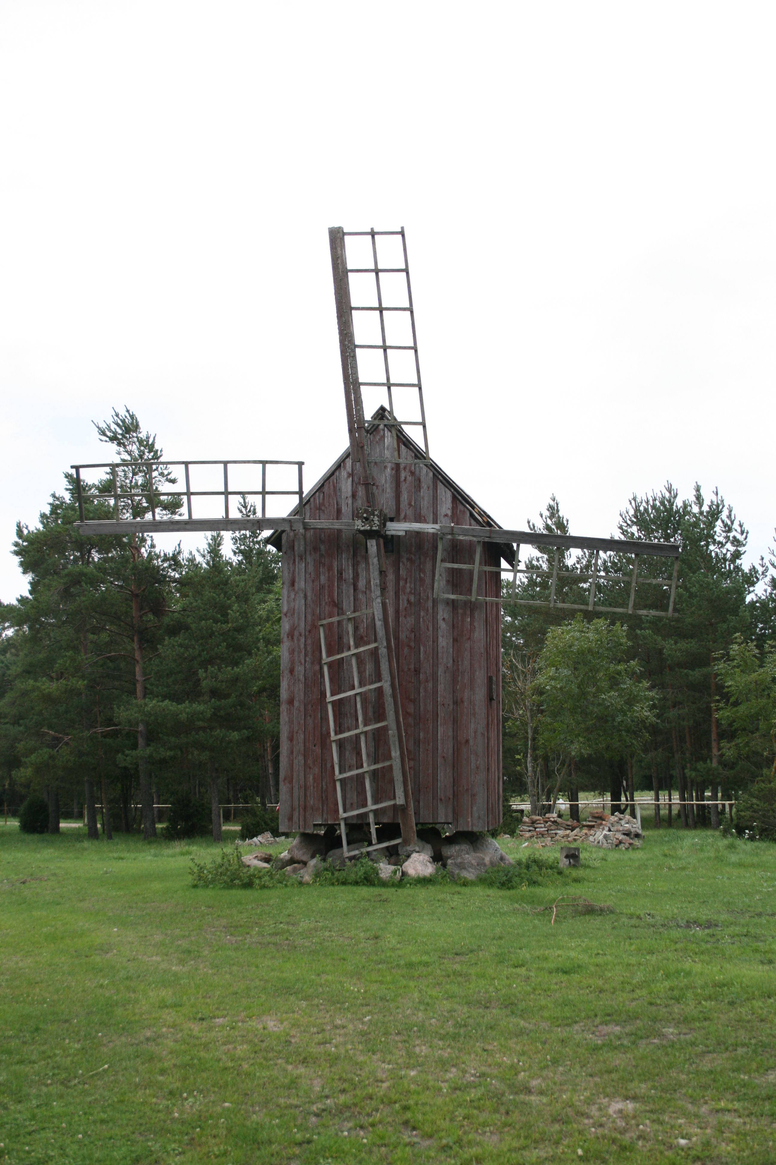 Hiiumaa, Käina vald, Kassari, Esiküla küla. Ristete tuulik.